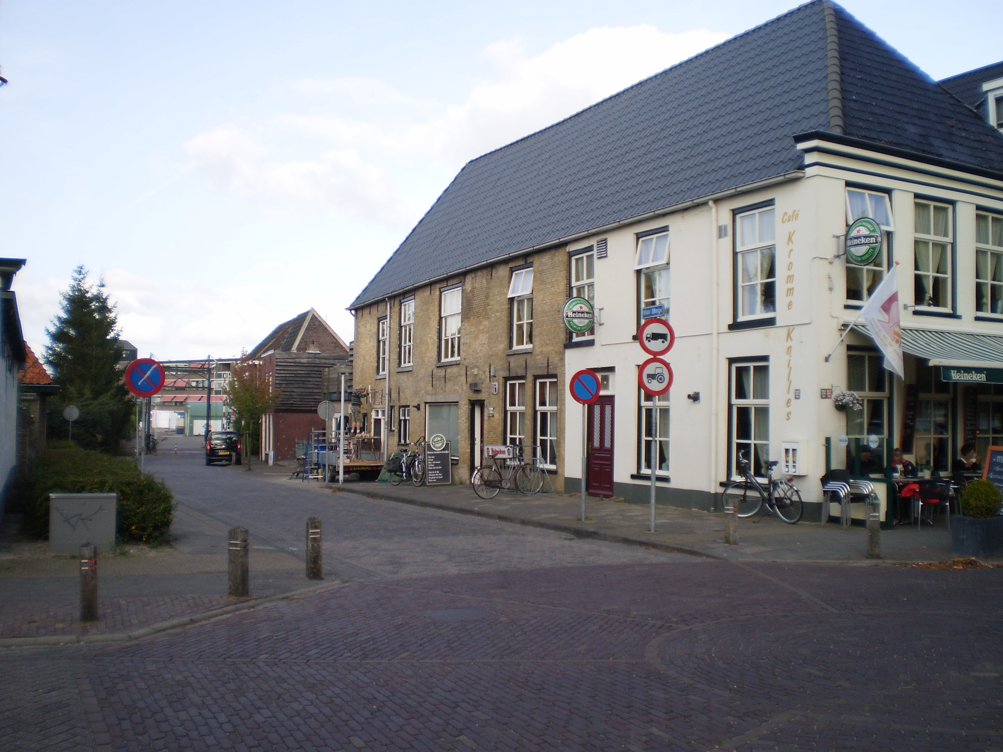 Wide Stege, Akkrum